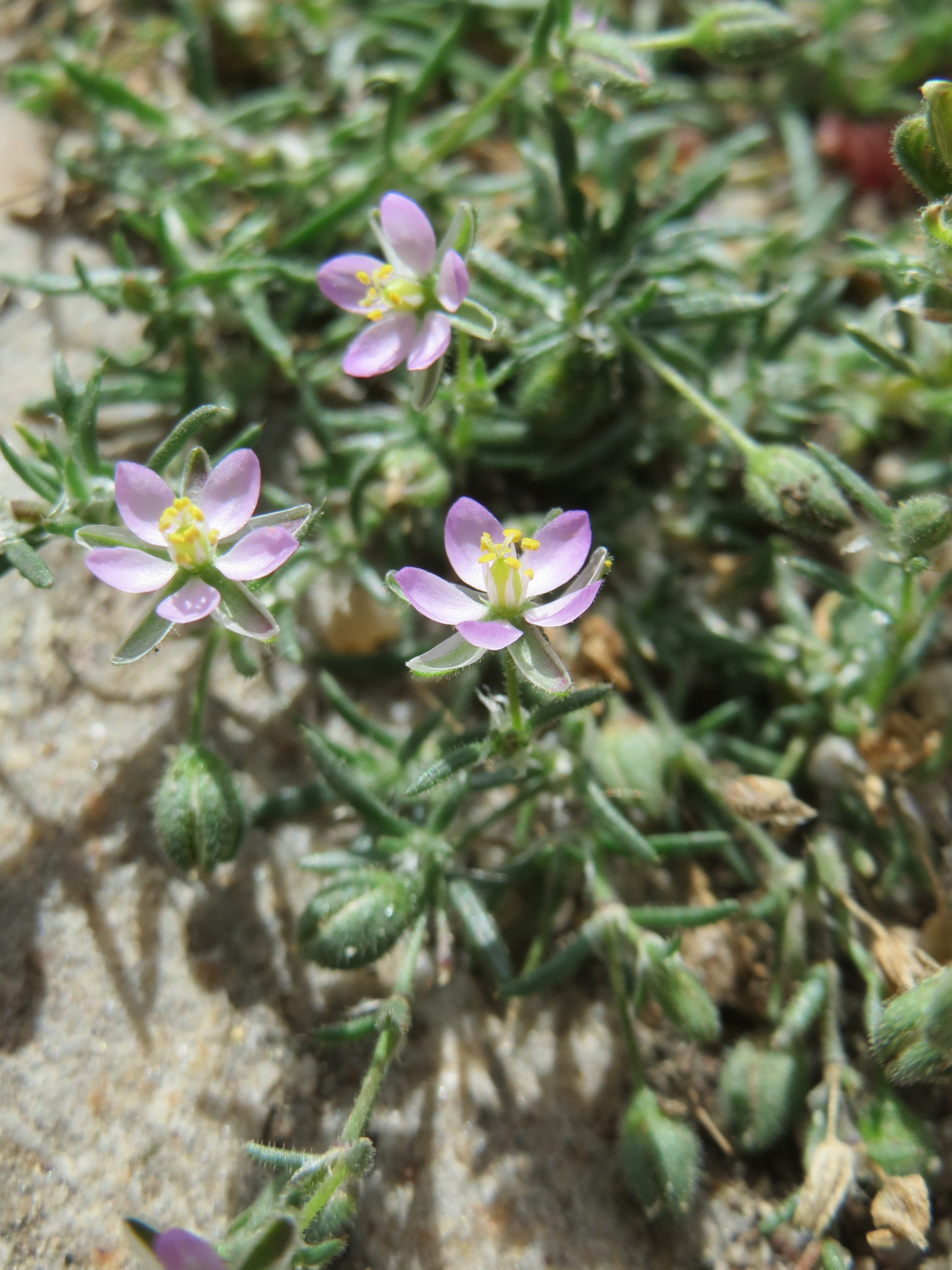 Ritzenbotanik: Rote Schuppenmiere (Spergularia rubra) in Wiesbaden-Nordenstadt